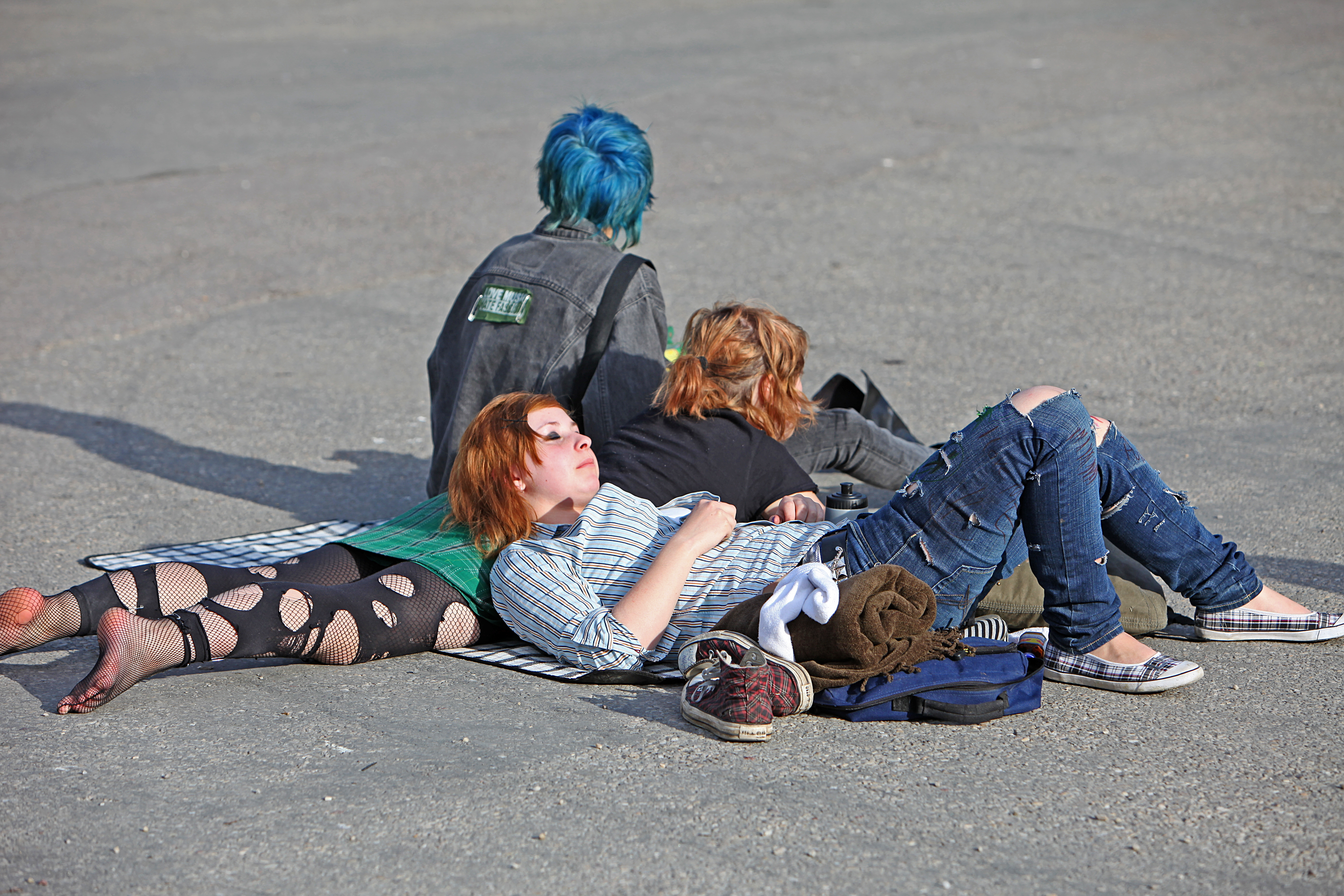 "Ung publik tar in sol och musik", Kungsträdgården, Stockholm, Sweden